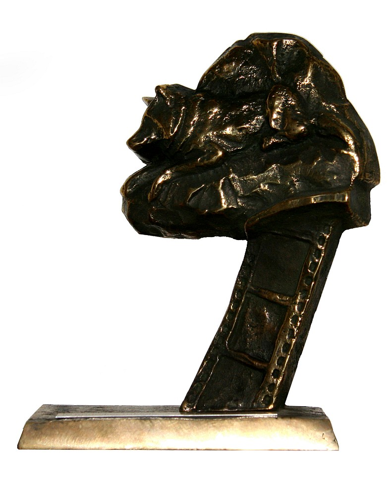 Golden Fang Award 2009 (Prize)